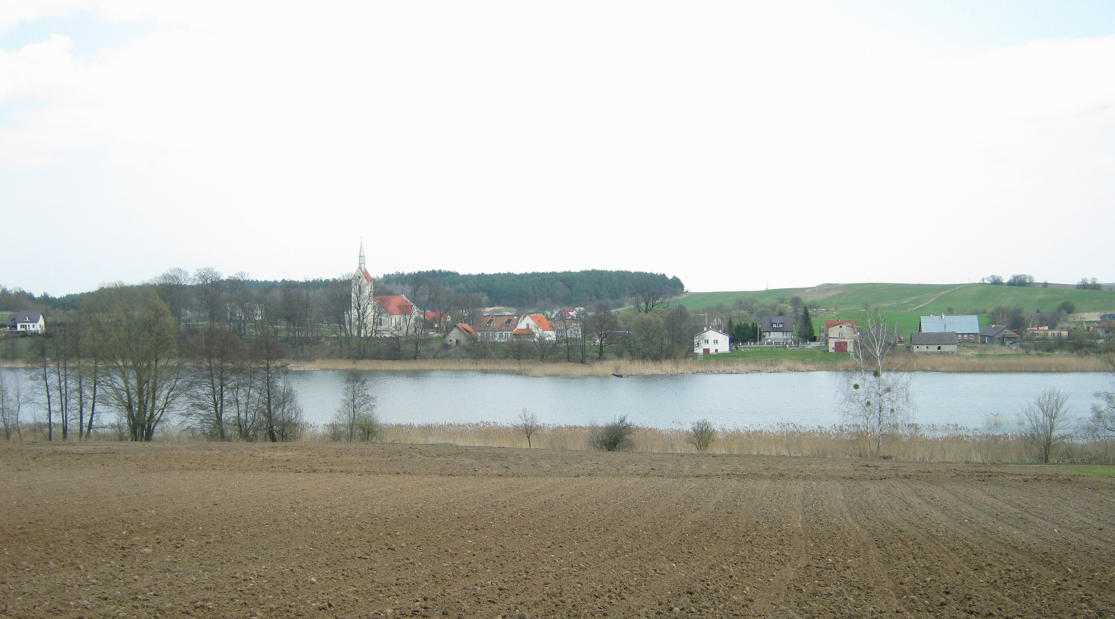 wieś Kumielsk - powiat piski